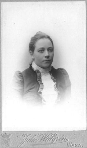 Elin (Elli) Ansas ennen vuotta 1904 (kuvaamo toimi siihen vuoteen saakka), kuvaaja Julia Widgren(1842-1917) toimi ateljeekuvaajana Vaasassa 1866-1904. Ansas perusti Vaasan käytännöllisen naisopiston.